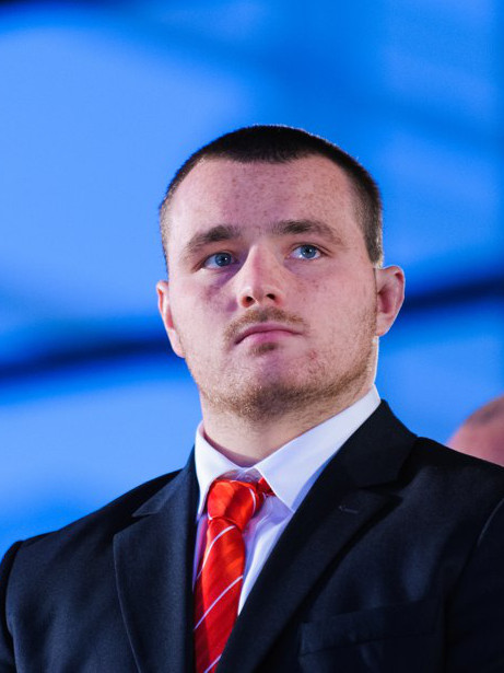 Ken Owens. Wales Grand Slam Celebration, Senedd 19 March 2012 / Dathliadau Camp Lawn Cymru, Senedd 19 Mawrth 2012